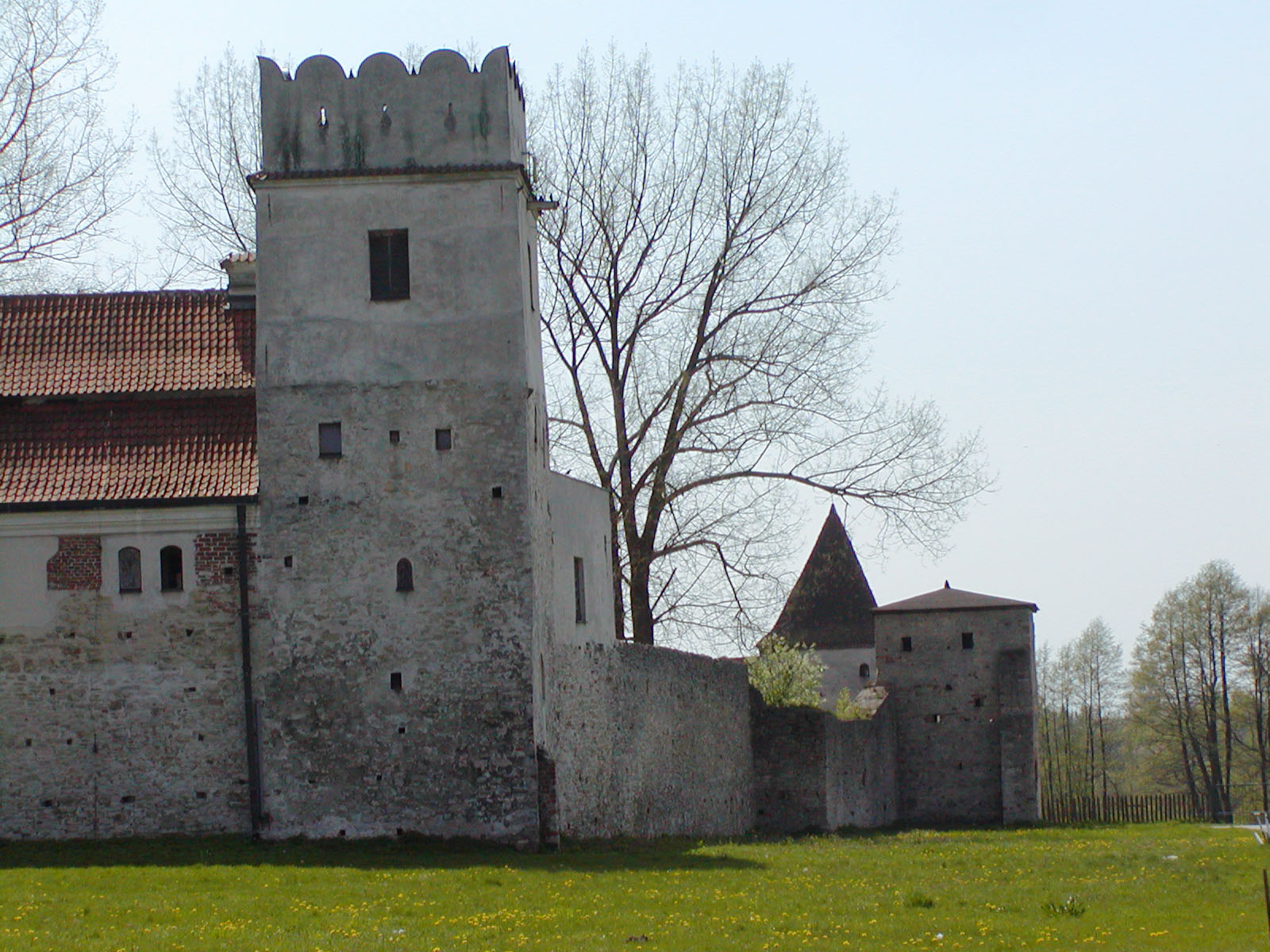 Sulejów Monastery Obwarowania klasztoru: Baszta Attykowa, Wieża Rycerska i Baszta Mauretańska